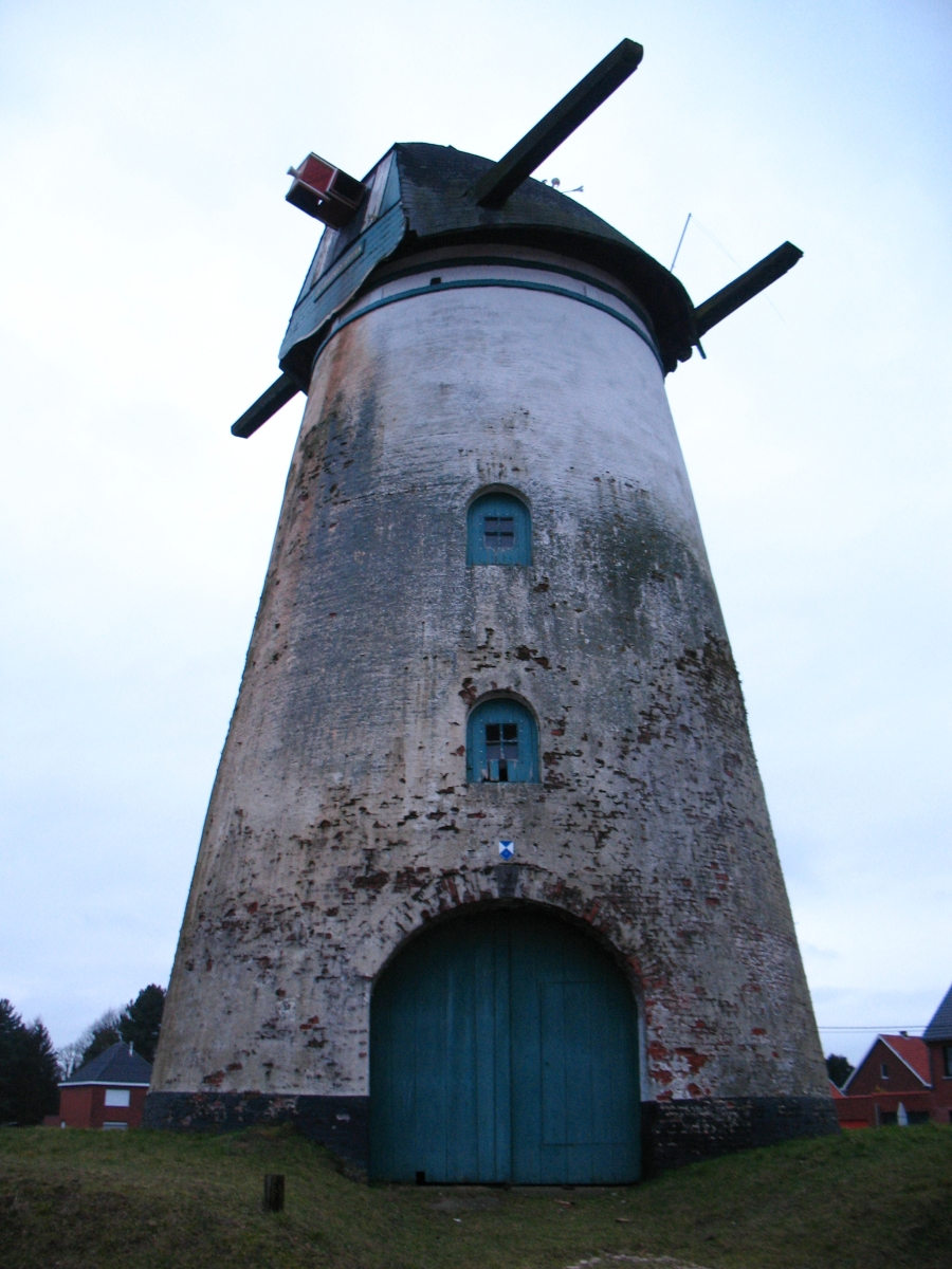 In Stormen Sterk te Gierle, provincie Antwerpen